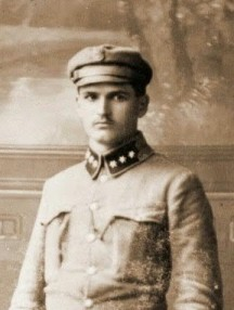 Tadeusz Michejda ve vojenské uniformě